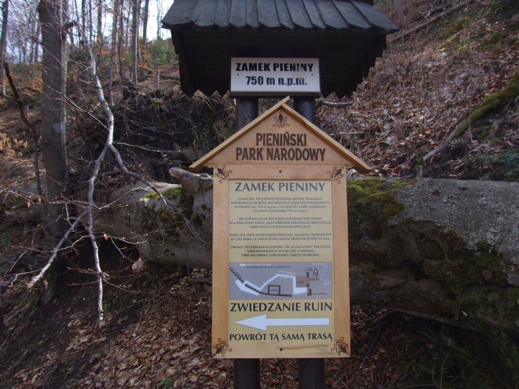 Tablica informacyjna na Zamku Pienińskim